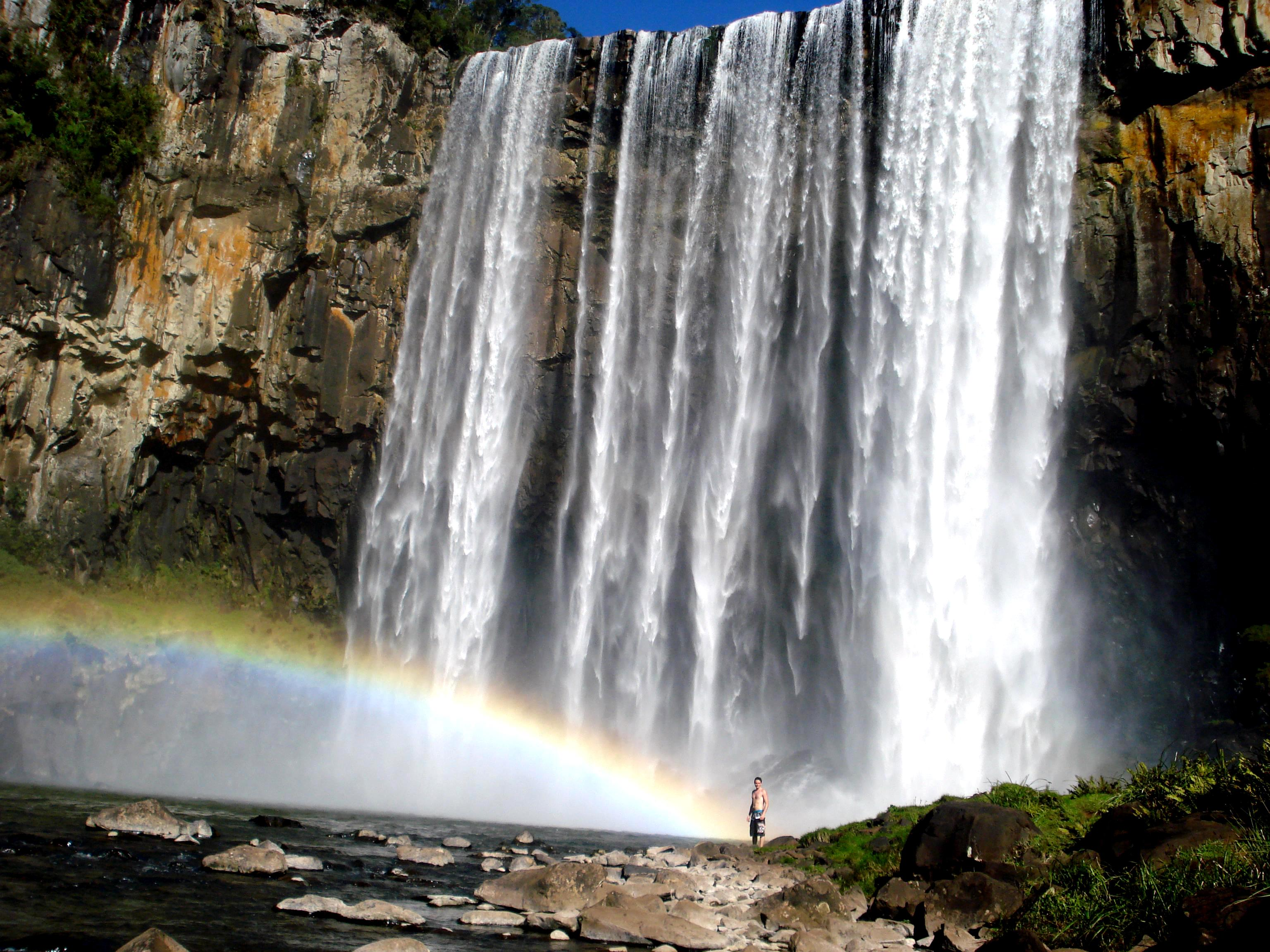 Cachoeira do Rio dos Pardos - Porto União/SC (Distrit. Stª Cruz do Timbó)